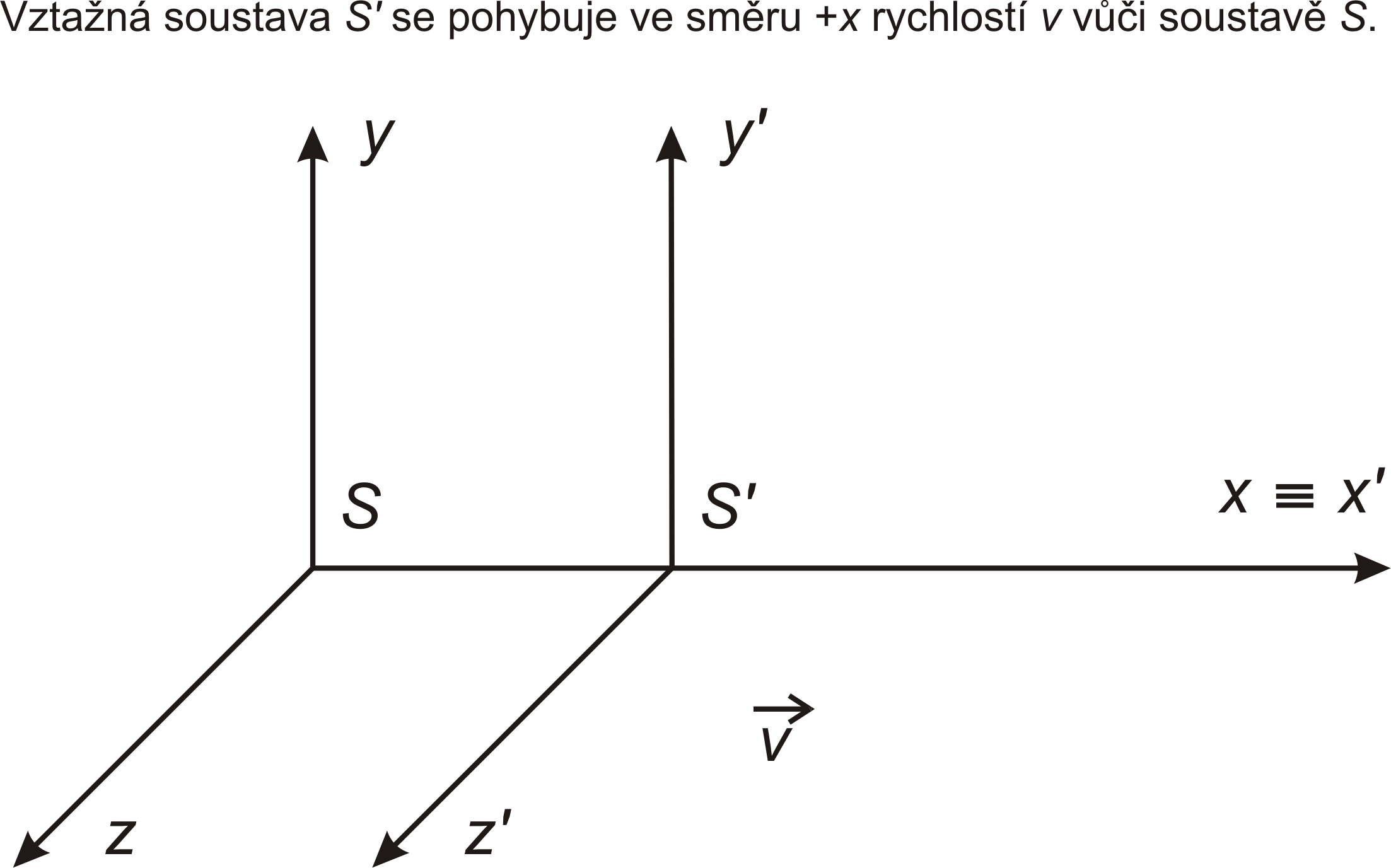 Nákres vzájemné polohy a pohybu vztažné soustavy S a S'.